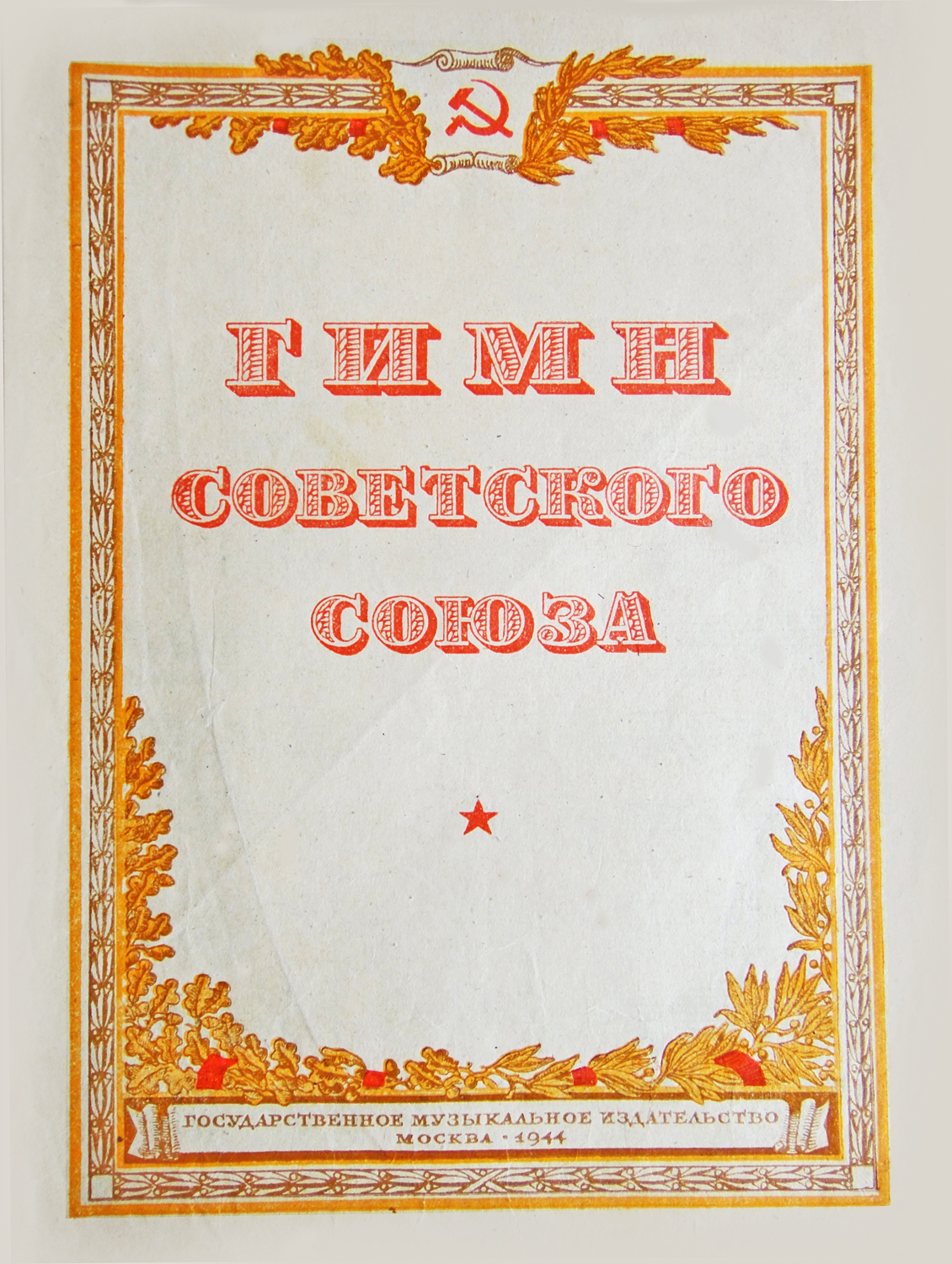 Гимн СССР. Обложка первого издания, подписанного в печать 2 января 1944 x